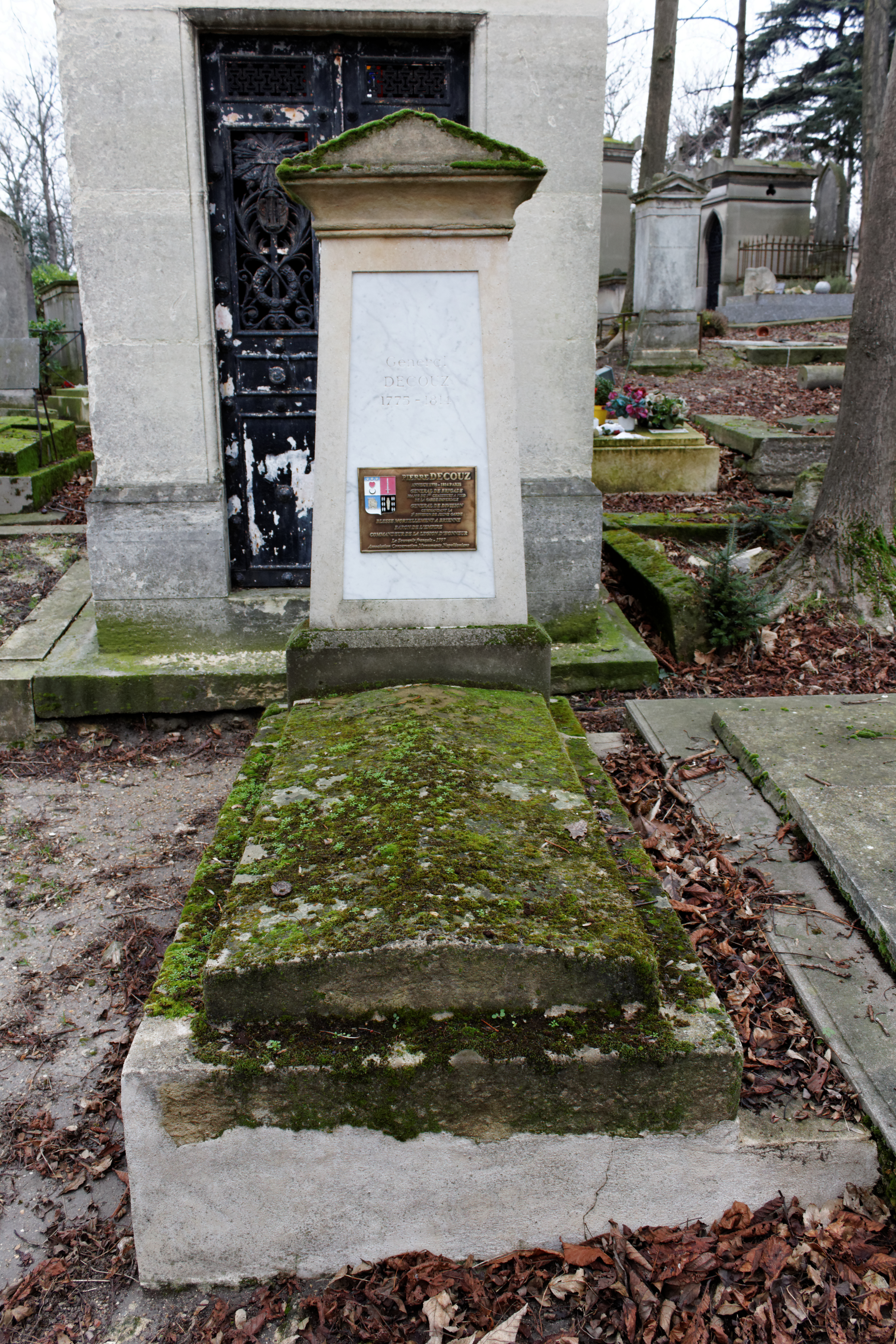 Vue d'ensemble